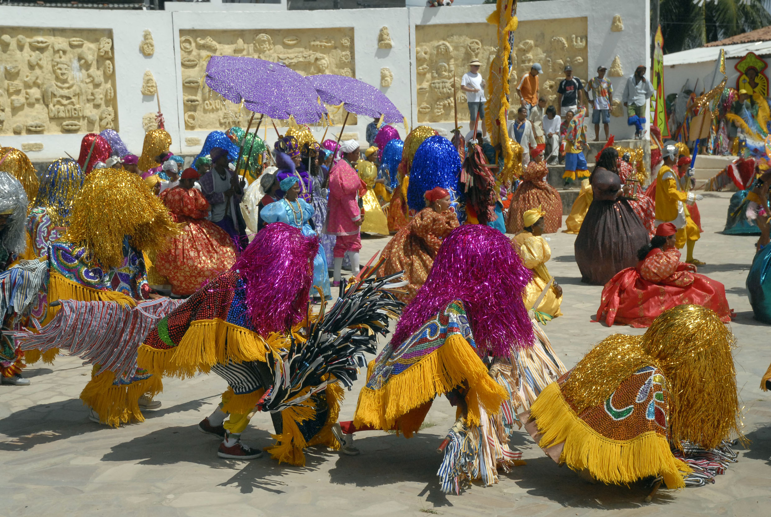 Encontro estadual de maracatus, Carnaval do Recife, Pernambuco, Brazil